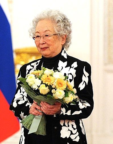 Йоко Нагаэ Ческина на церемонии награждения в Кремле 4 ноября 2014 года